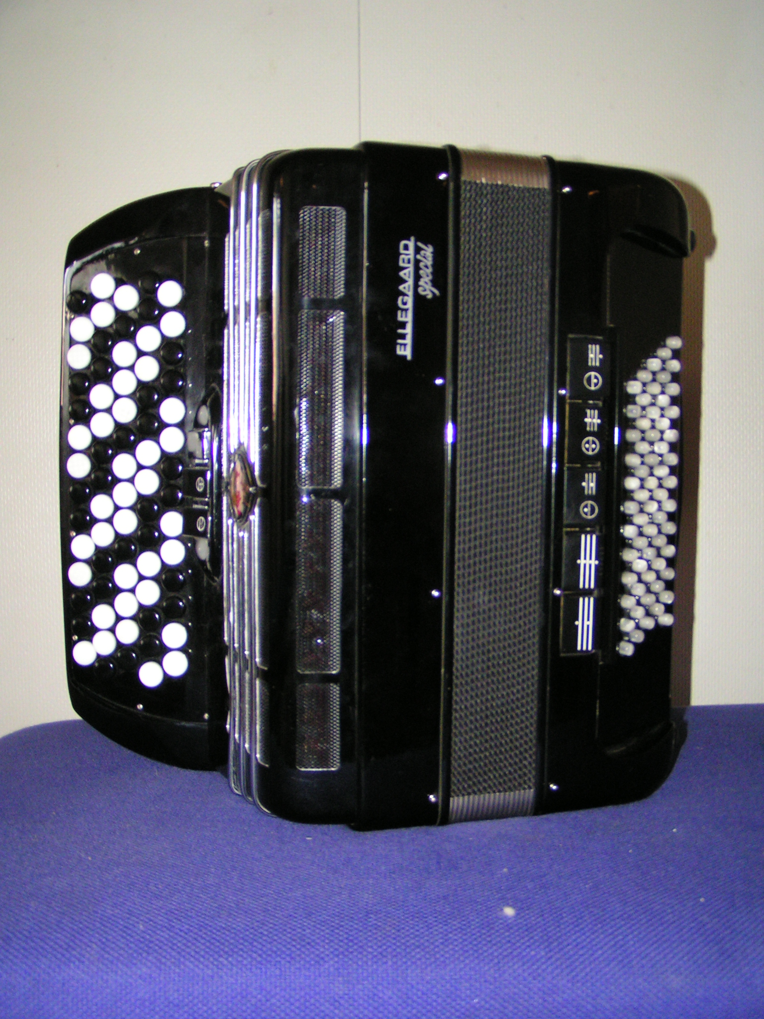 Accordion